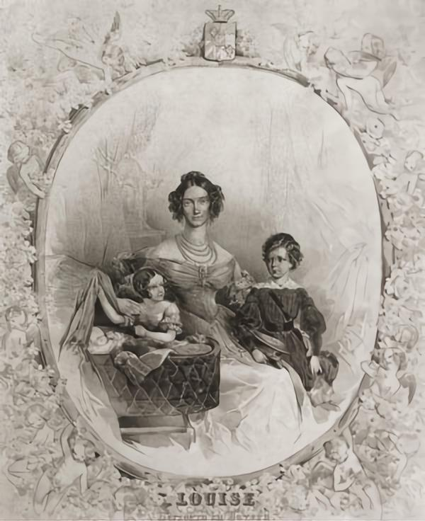 Ludovika Wilhelmine von Bayern mit ihren Kindern Ludwig in Bayern und Helene in Bayern